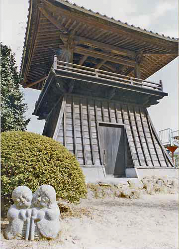 From [1]